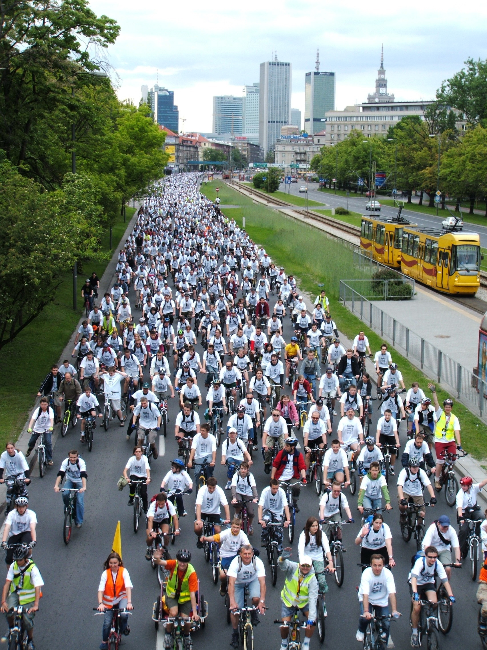 Masa na Autyzm2006